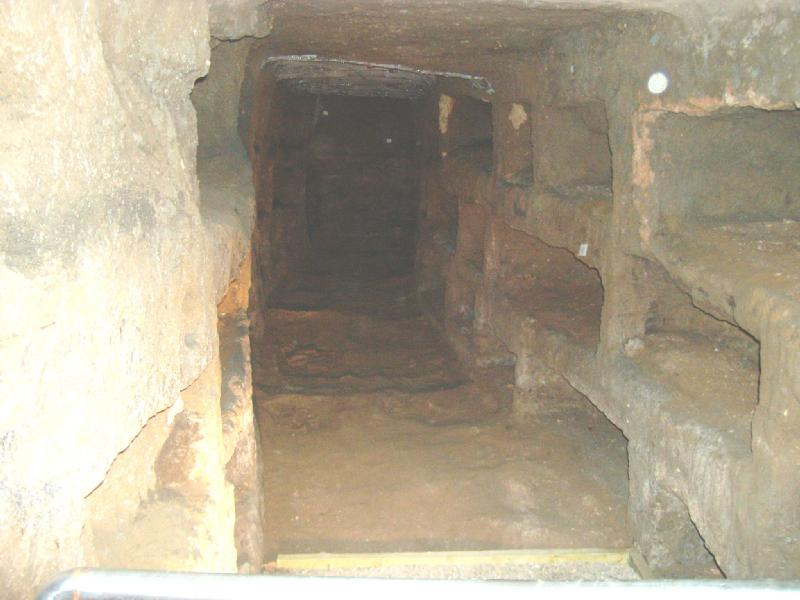 Catacombe ebraiche di Venosa